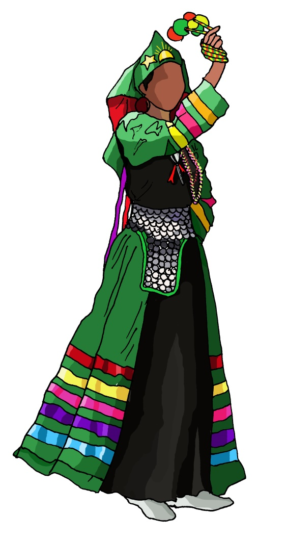 imagen descriptiva de vestuario Cuyacas de iquique gala